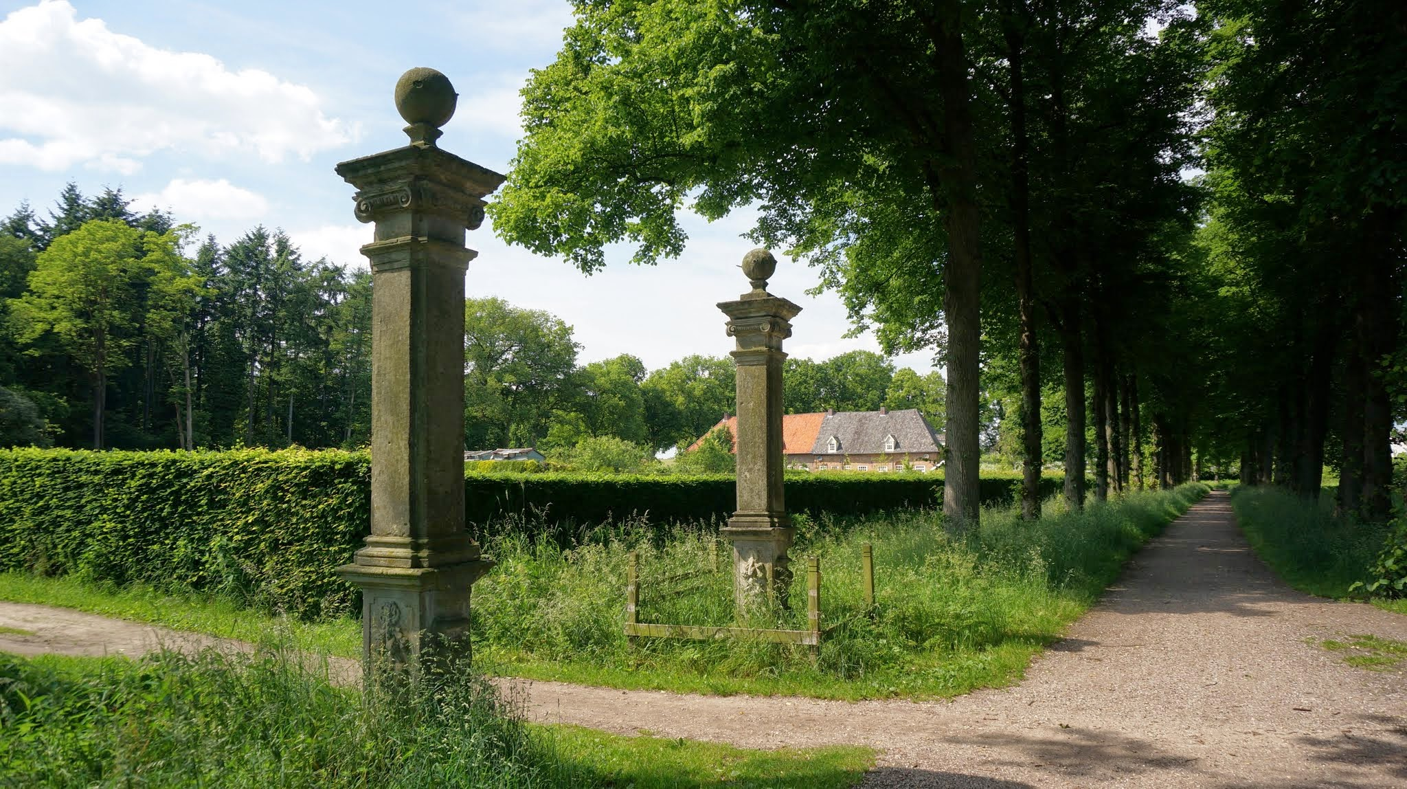 7041 's-Heerenberg, Netherlands